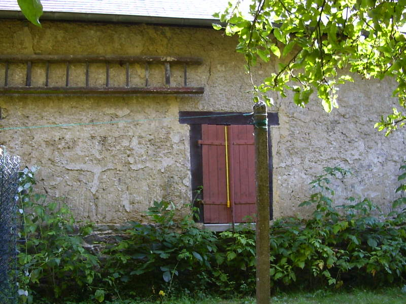 Longère en torchis typique du bassin rennais ; celle-ci est destinée à être rasée par un promoteur pour implanter un immeuble de 18 m.